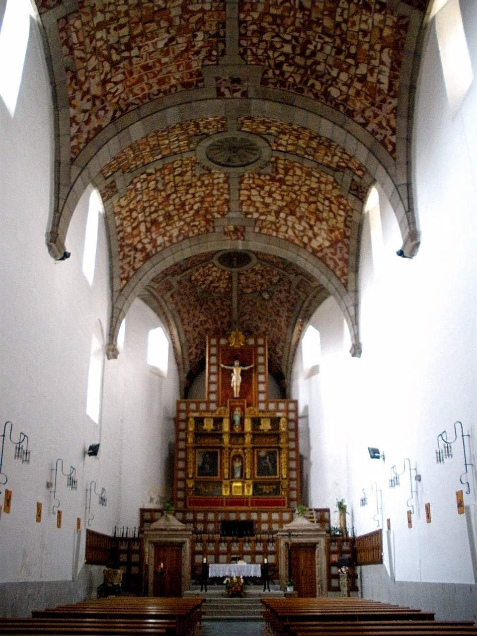 Avila - Iglesia de Santa Maria de Jesus (Ex Convento de las Gordillas)